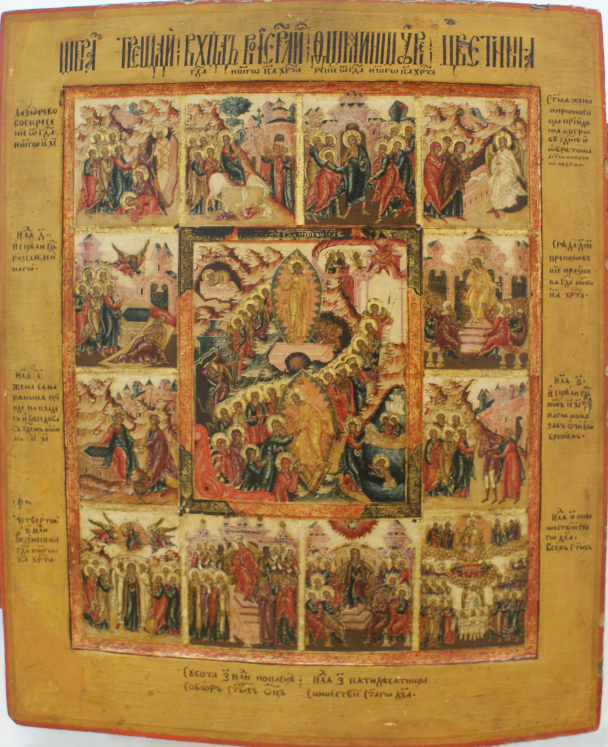 Абраз "Уваскрашэнне Хрыстова" (Трыодзь каляровая)